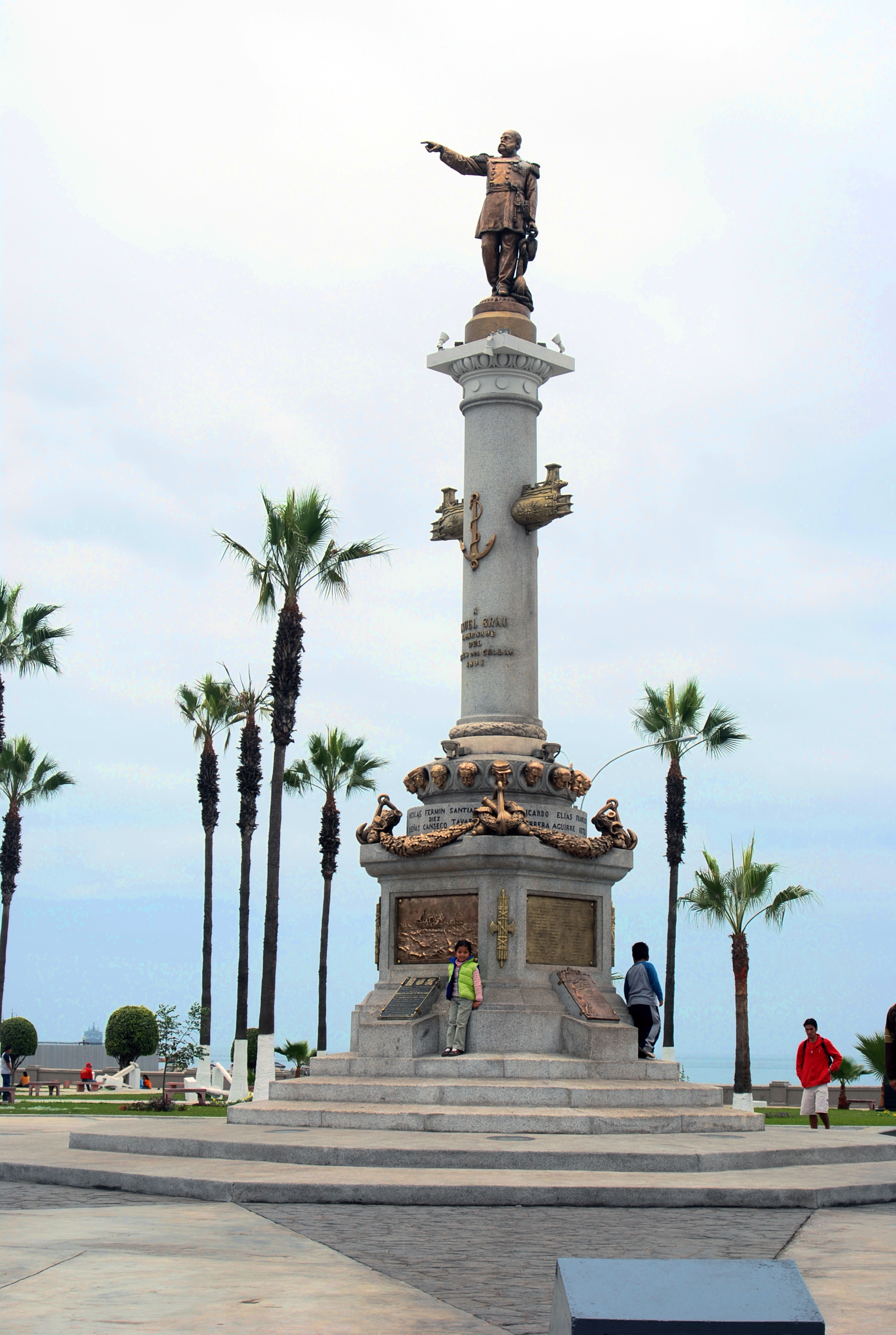 Monumento a Miguel Grau, en Callao, Peru